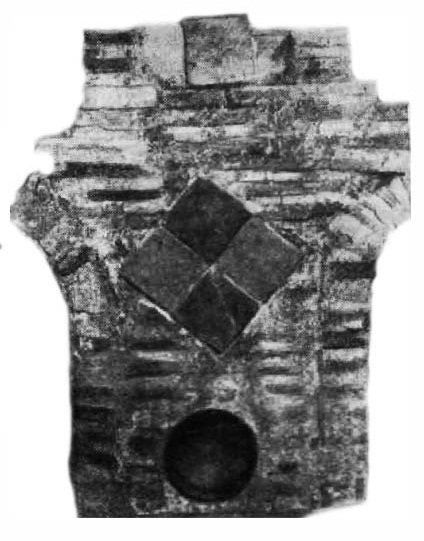 Прасценак паміж парнымі вокнамі Ніжняй царквы ў Гродне